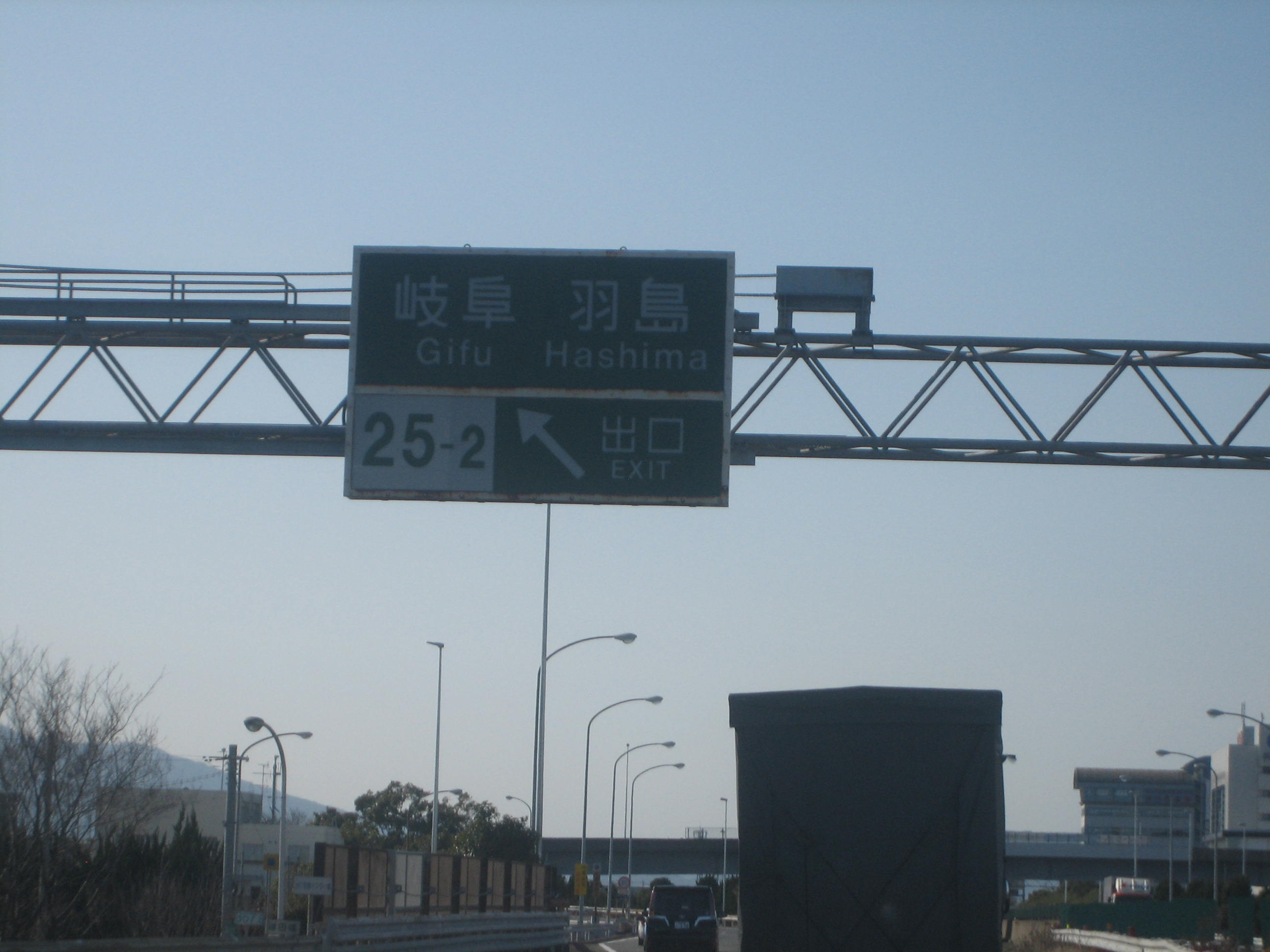 岐阜羽島ICの標識